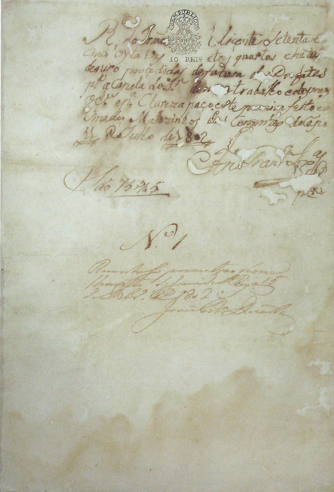 Recido autógrafo de Aleijadinho pelo trabalho dos profetas do Santuário de Bom Jesus de Matosinhos.